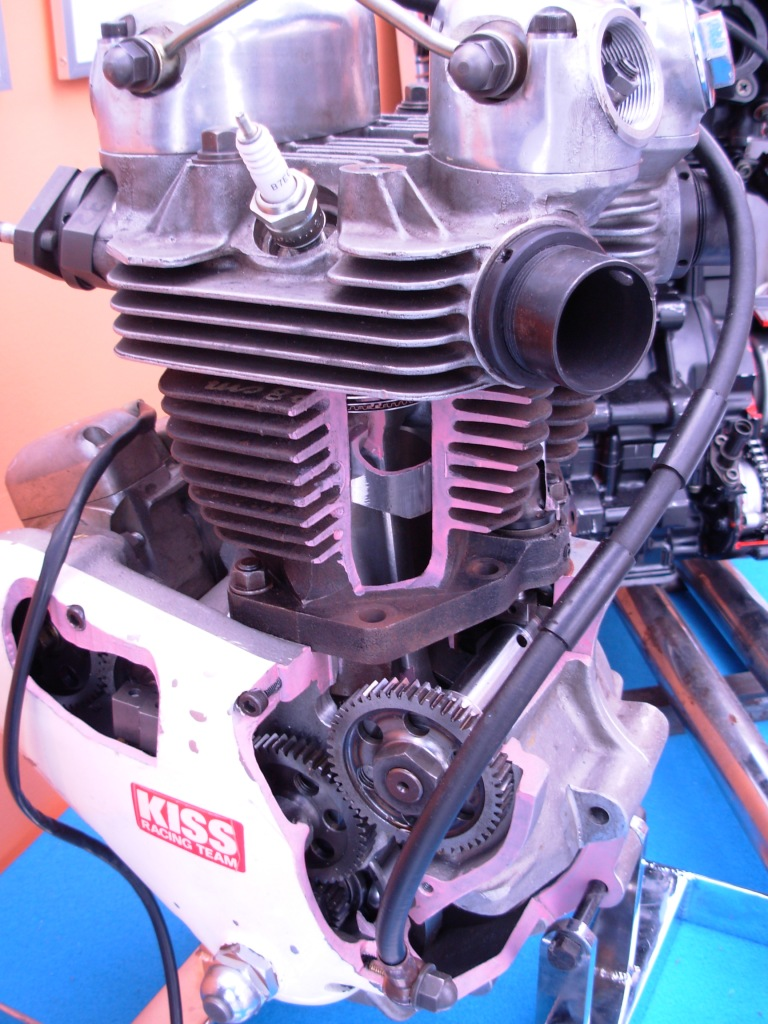 メグロ1級車二気筒MR型のカットエンジン。2007年4月28日、川口オートレース場内『ノスタルジックレーサーズギャラリー』にて投稿者自身が撮影。